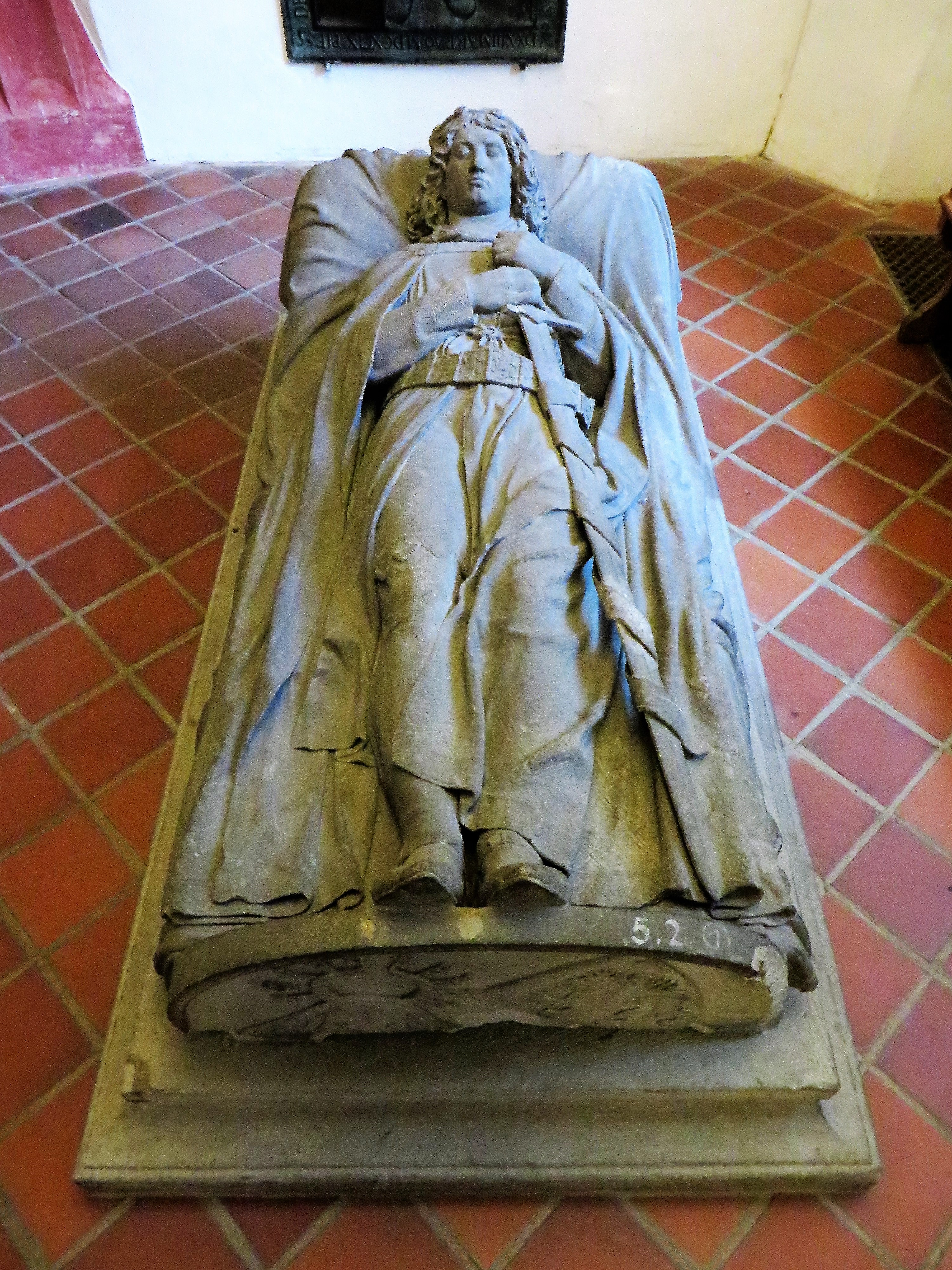 Ev. Stadtkirche St. Thomas Leipzig. Sarkophagdeckel für Markgraf Dietrich von Wettin, genannt „Diezmann“. Geschaffen von Bildhauer Ernst Rietschel im Jahre 1841.